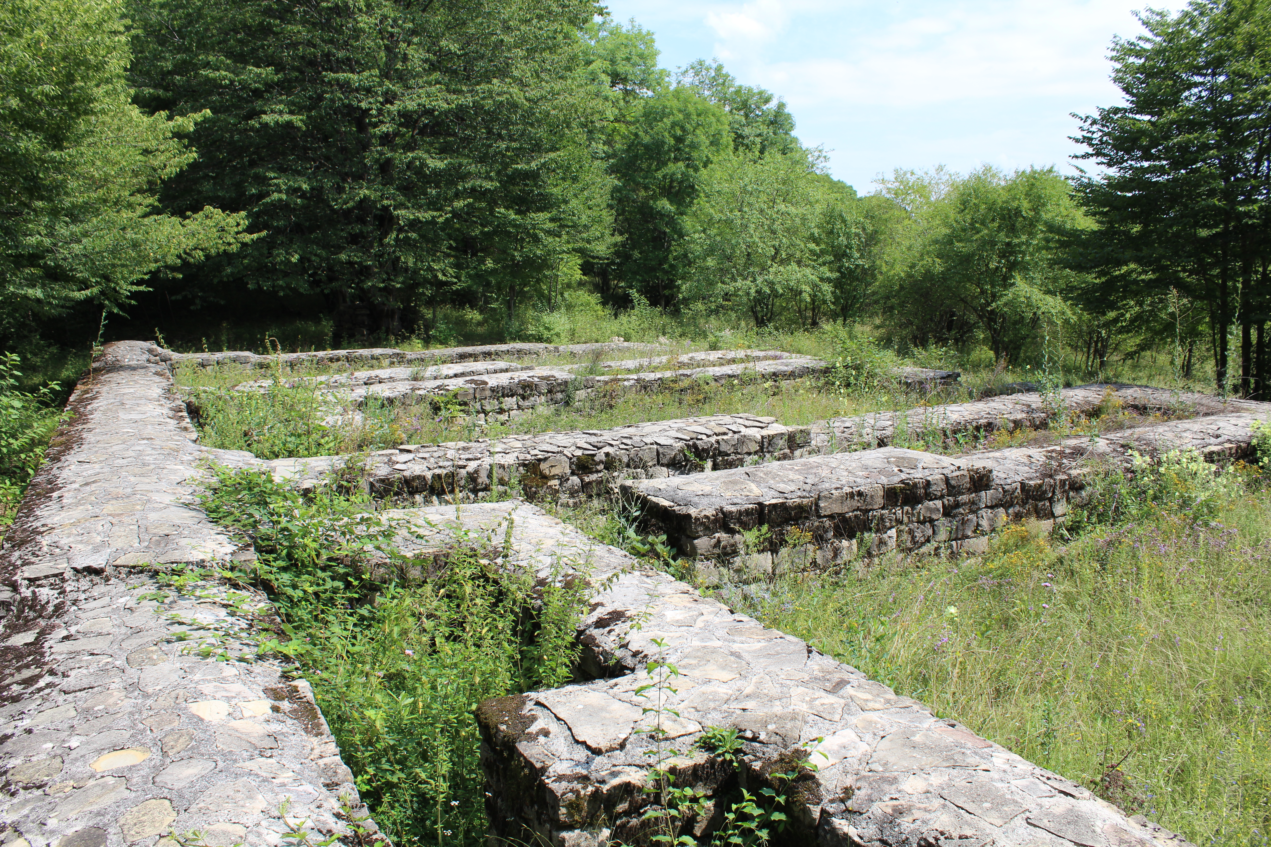 ჭერემის სასახლის ნანგრევები